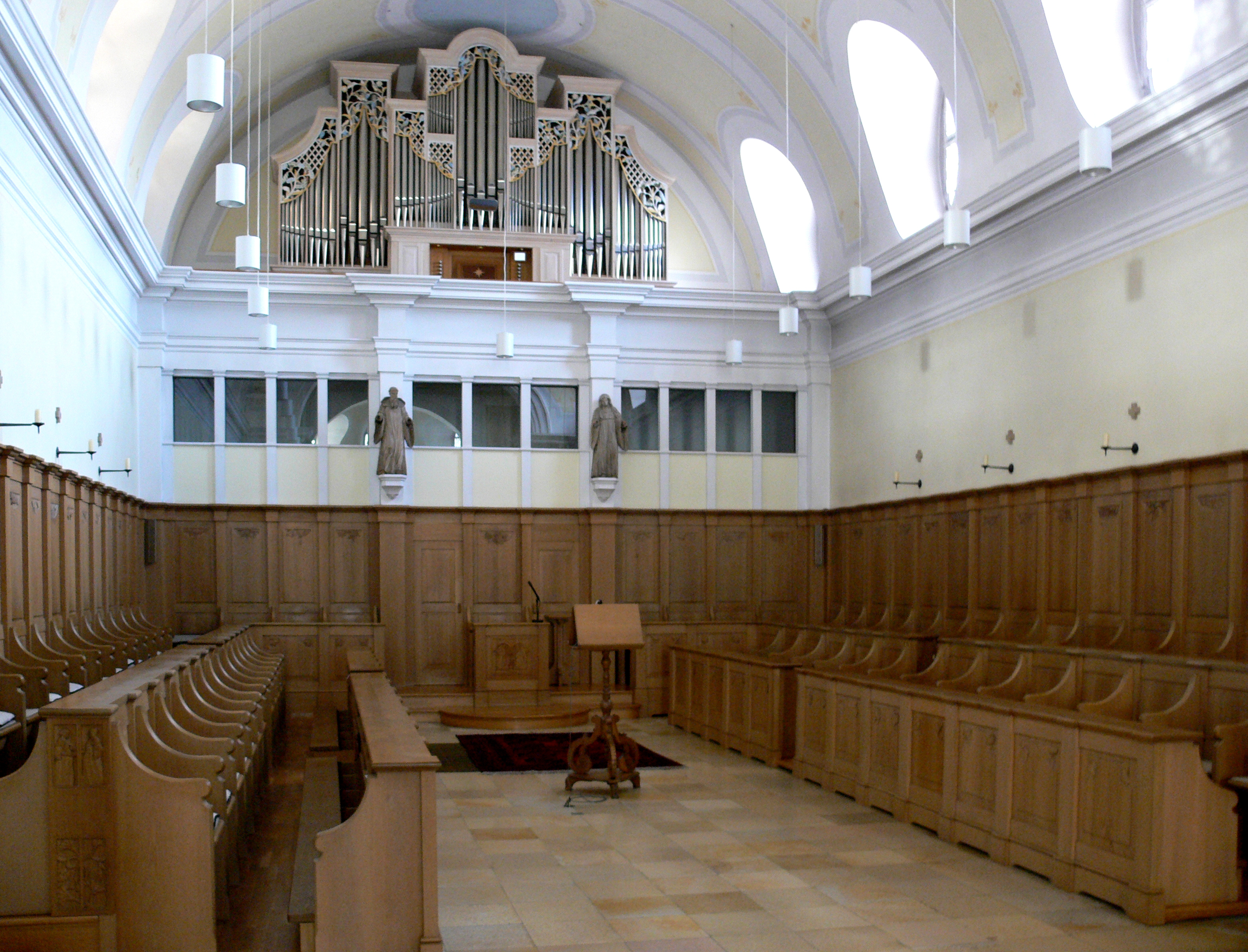 Abtei St. Erentraud, Kellenried, 88276 Berg, Landkreis Ravensburg Klosterkirche Nonnenchor mit Chorgestühl und Hauptorgel